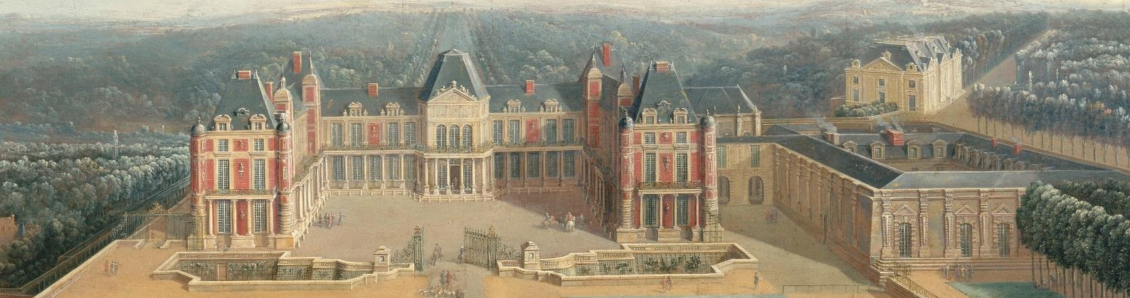 Le château de Meudon du côté de l'entrée, par Pierre-Denis Martin, 1723. Musée de Versailles.